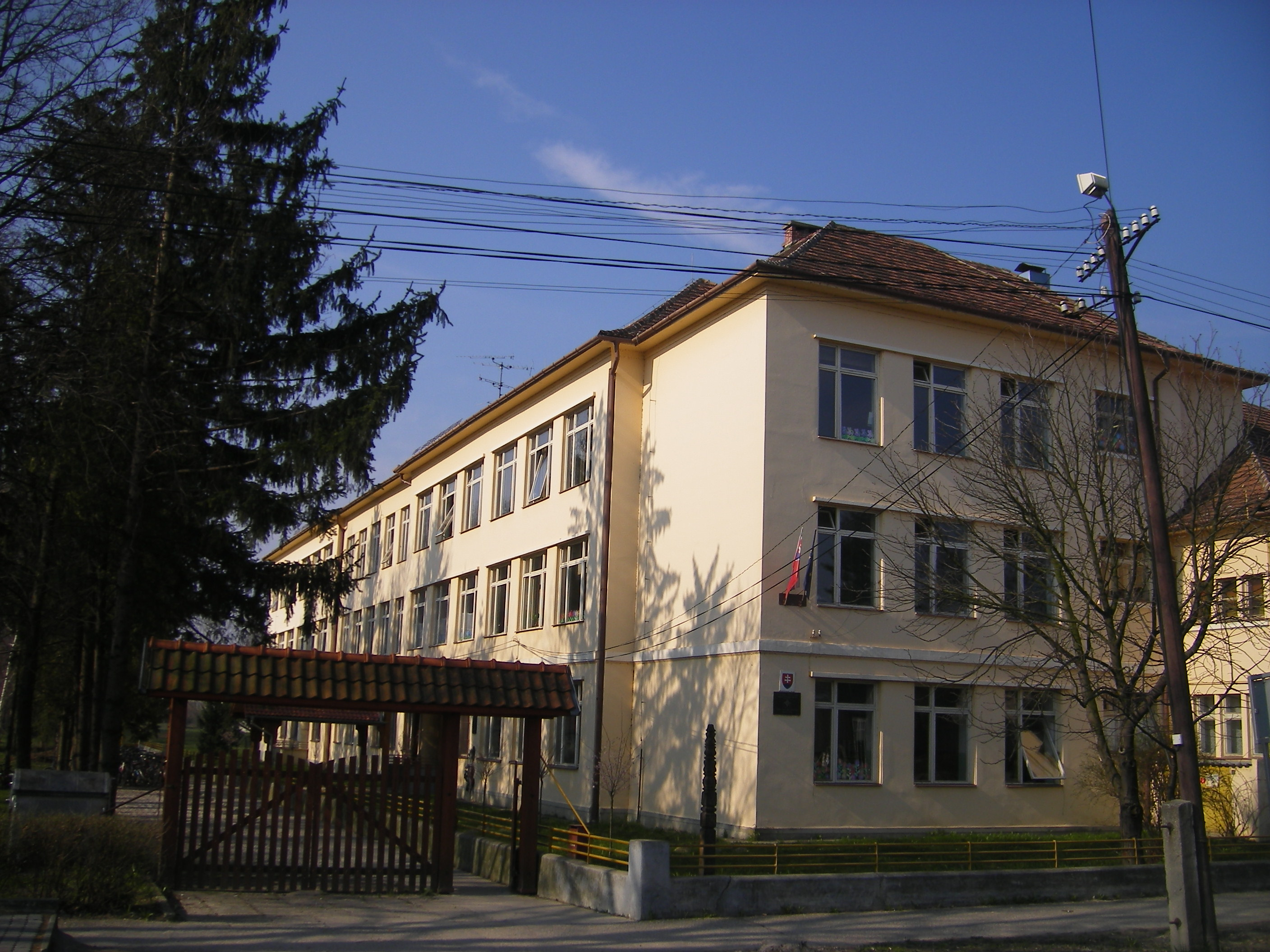 Gúta - a II. Rákóczi Ferenc Alapiskola